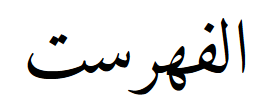 аль-фихрист